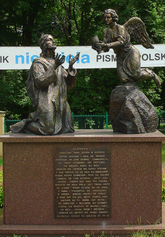 Częstochowa, zespół klasztorny paulinów na Jasnej Górze